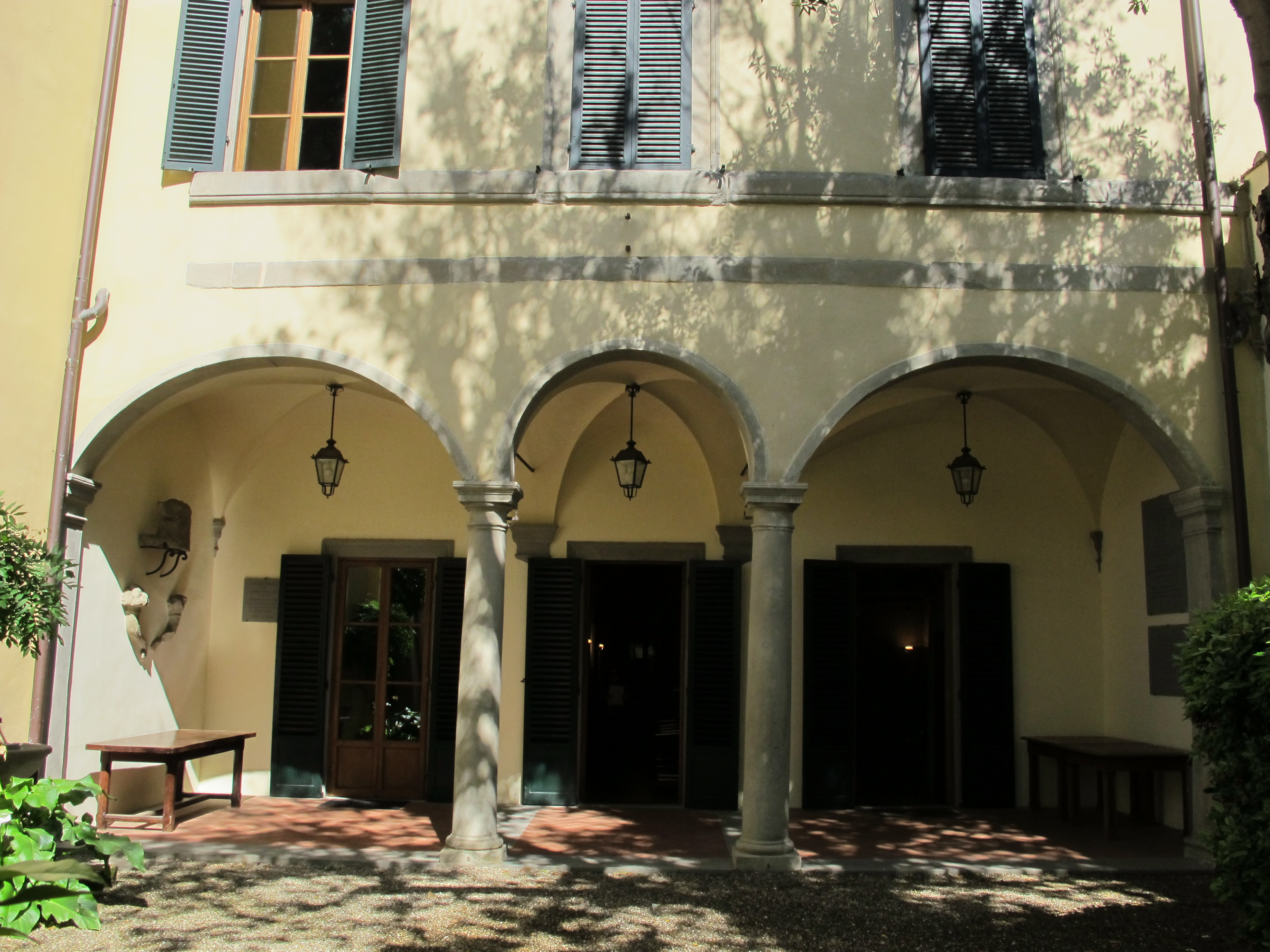 Casa di federico zuccari, giardino